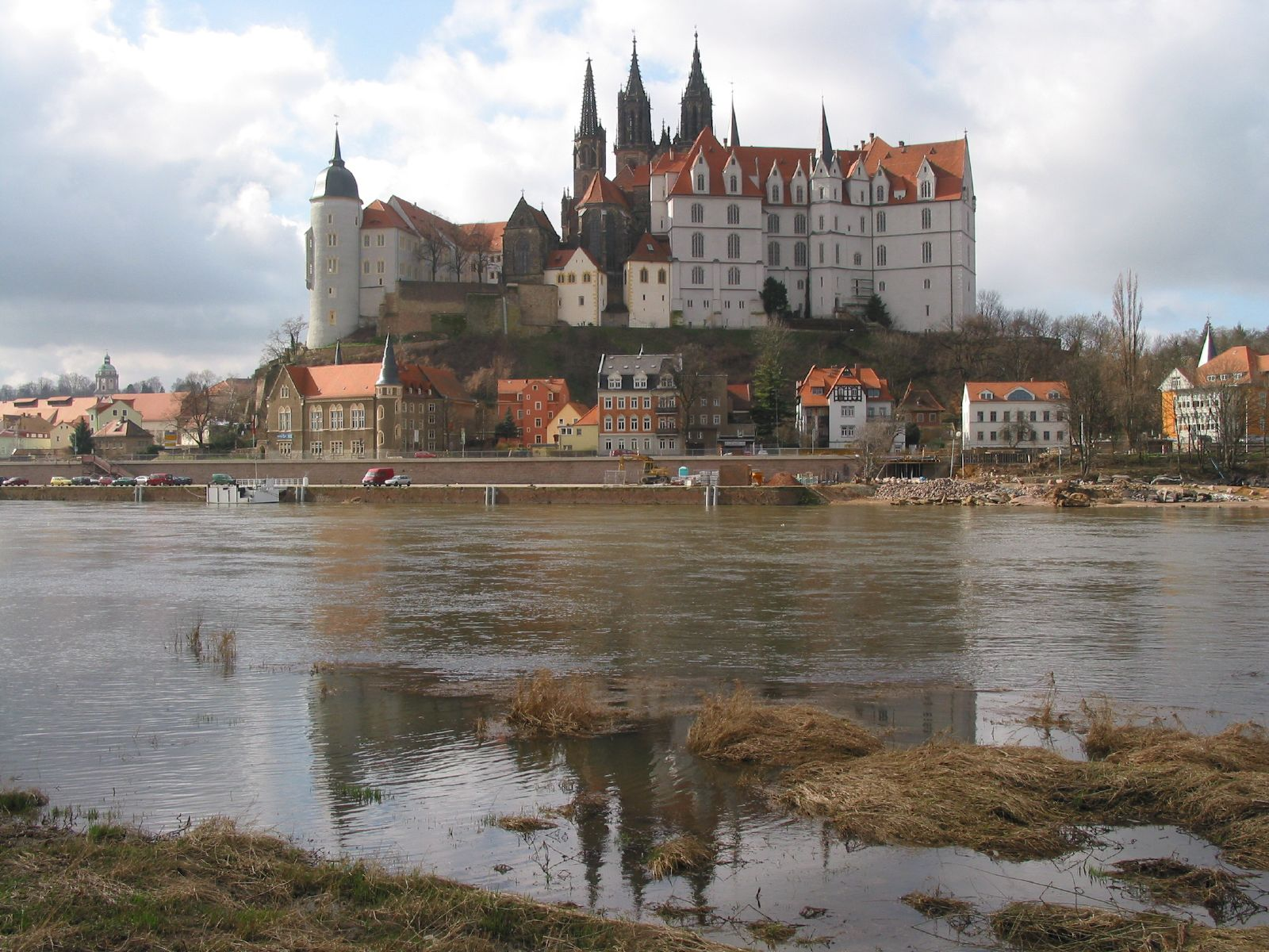 Albrechtsburg